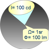 Omega-Strahler in Lichtstärke